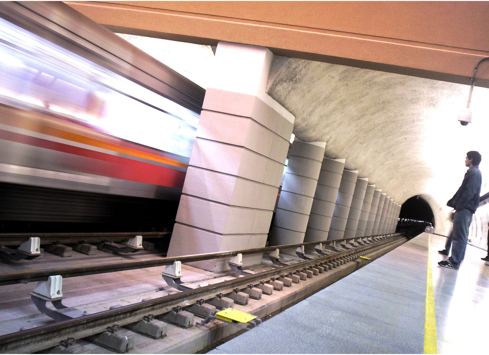 El autor de la imagen es José Cuevas Sepúlveda, que las cede a Der schöne Tod mediante autorización Wikipedia:Autorización para insertar material de Josephs con Copyright y en el about de sus fotolog.